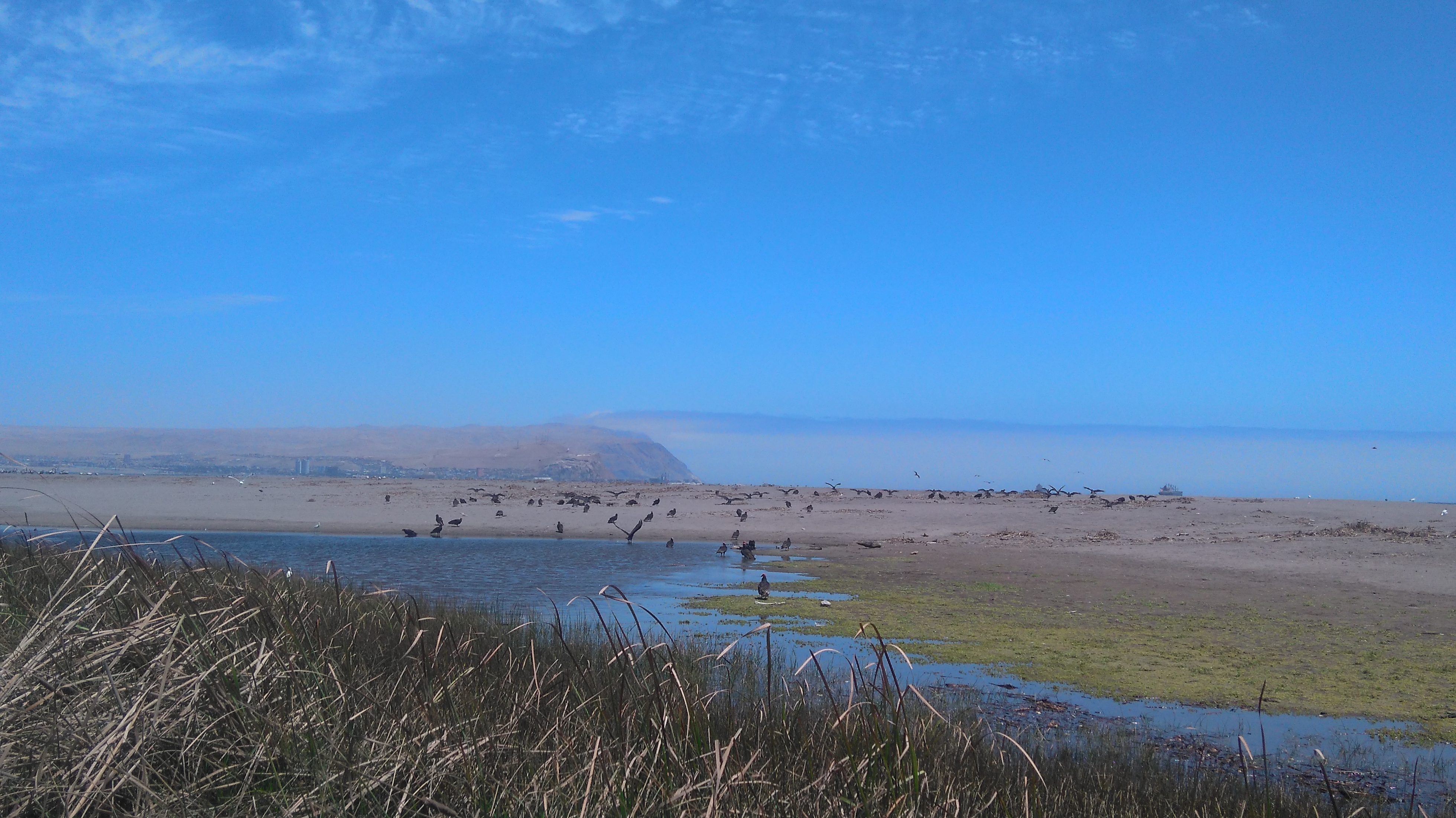 Humedal del río Lluta en Arica, Chile